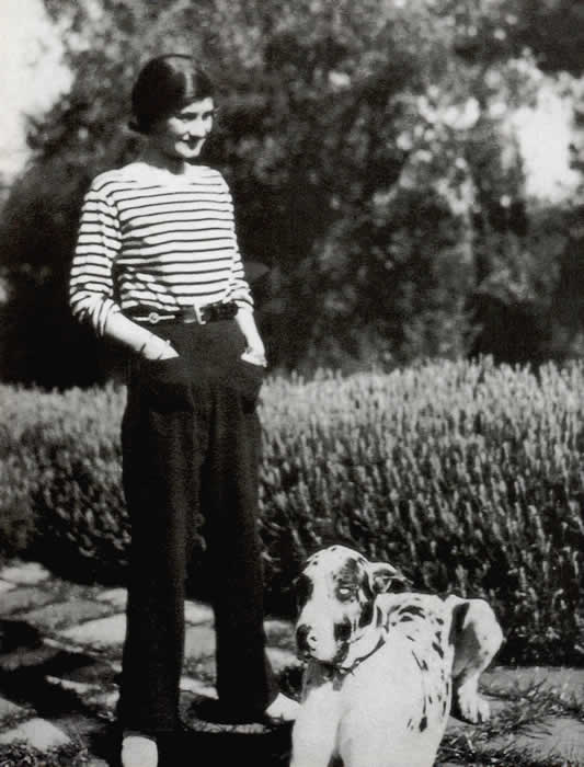 Gabrielle Chanel dans l’entre deux guerres pose en marinière.